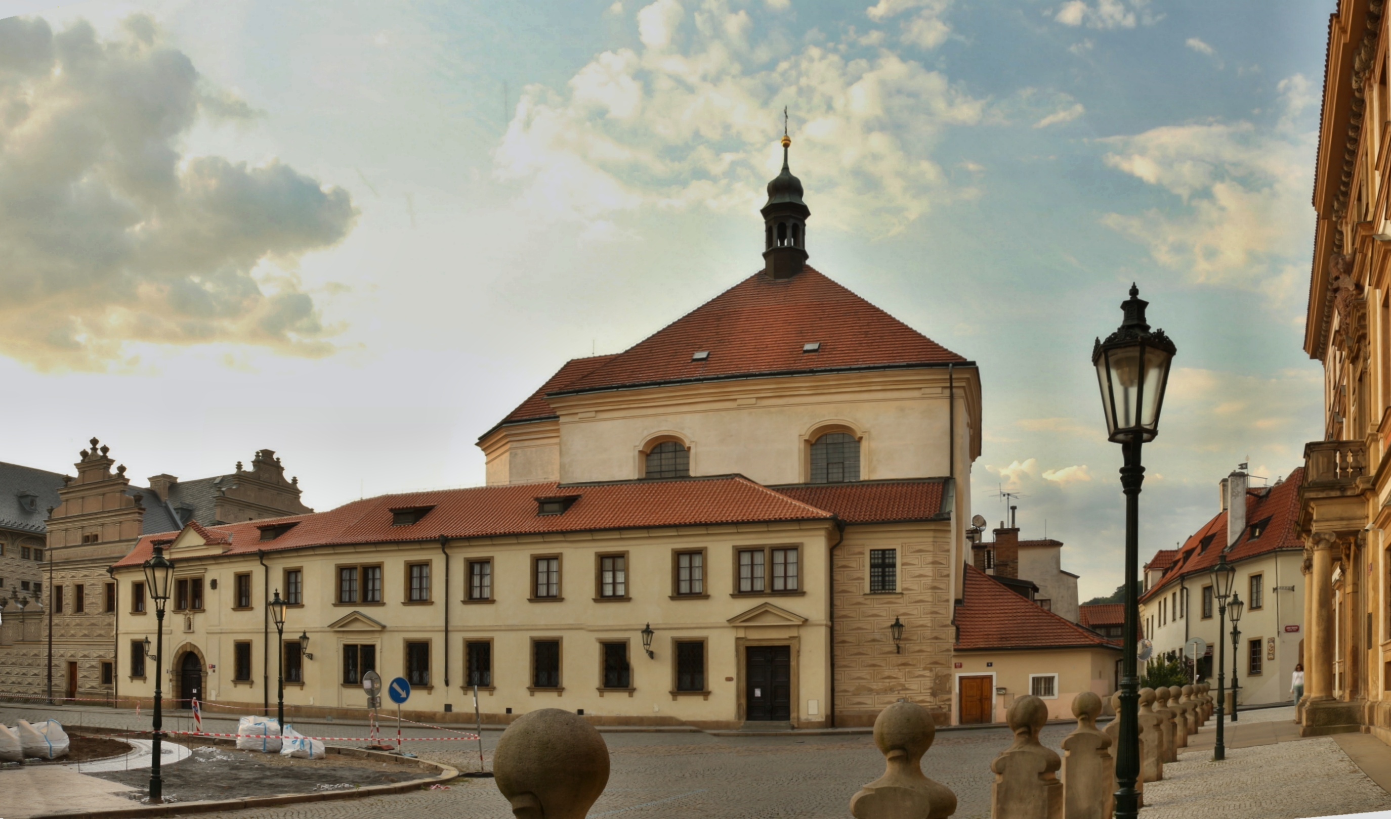 Klášter bosých karmelitánek s kostelem sv. Benedikta na Hradčanech v Praze